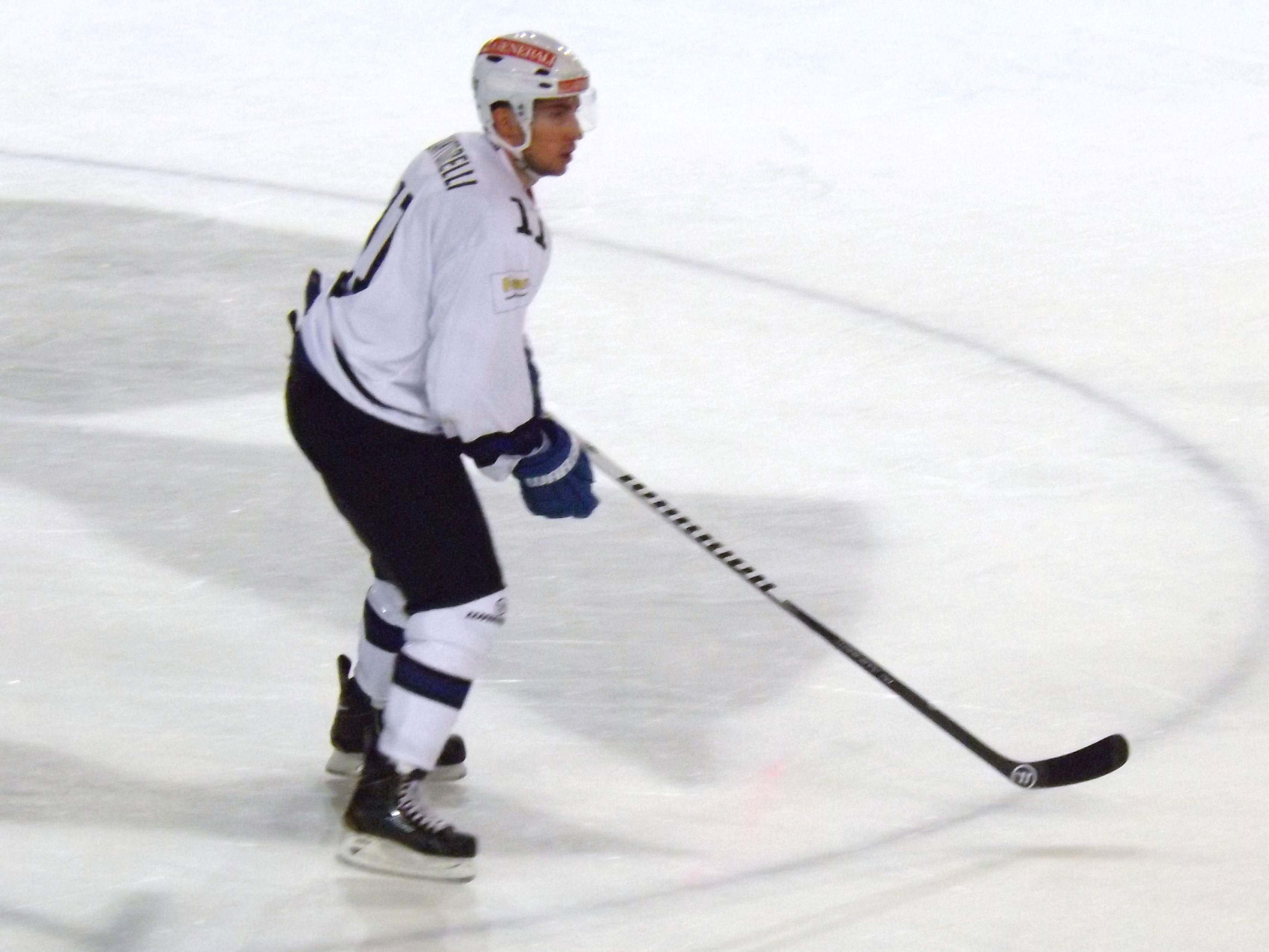 Joueur de hockey sur glace EC Villach, CHL 2014-2015